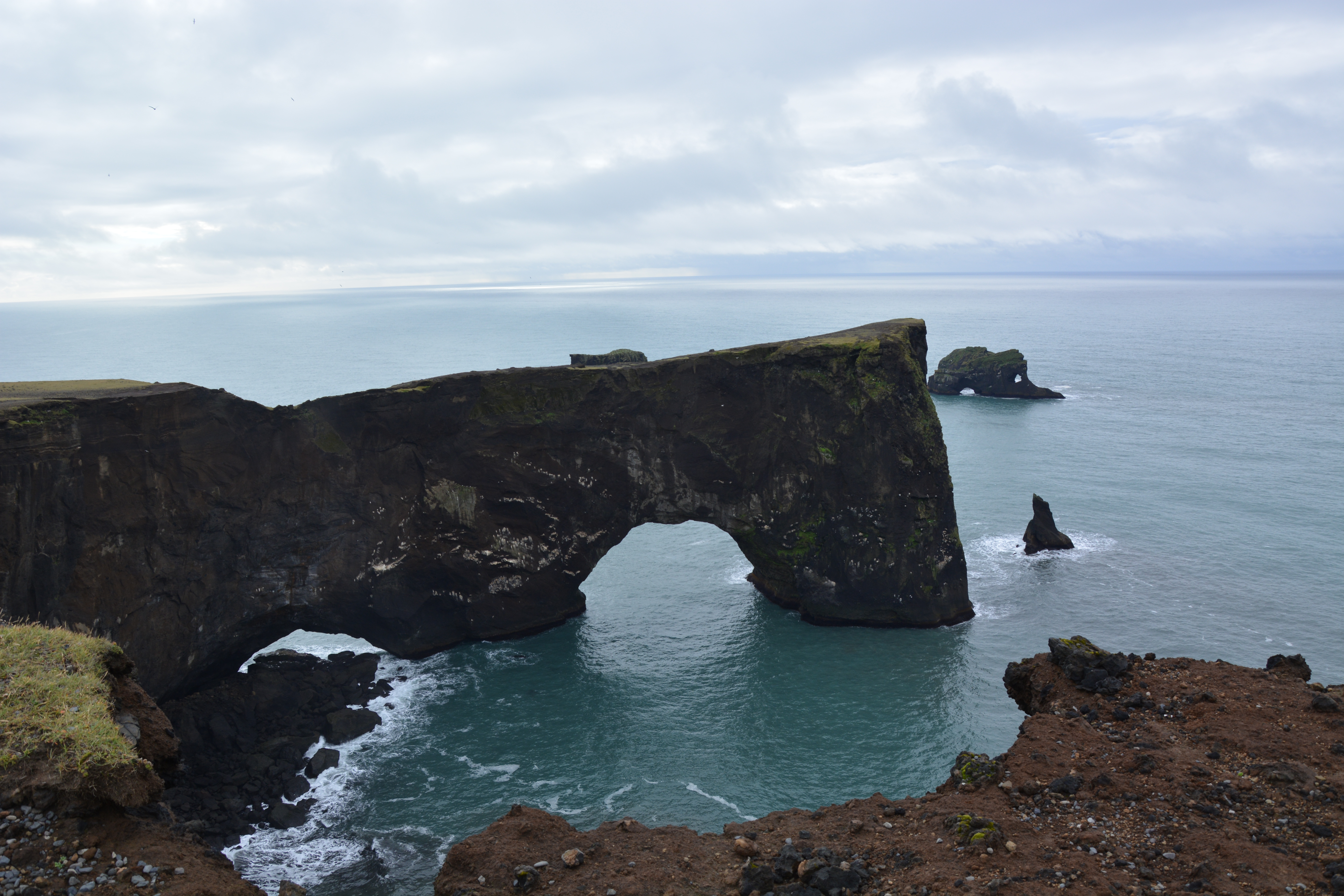 Vue de Dyrhólaey, au fond les arches, Islande